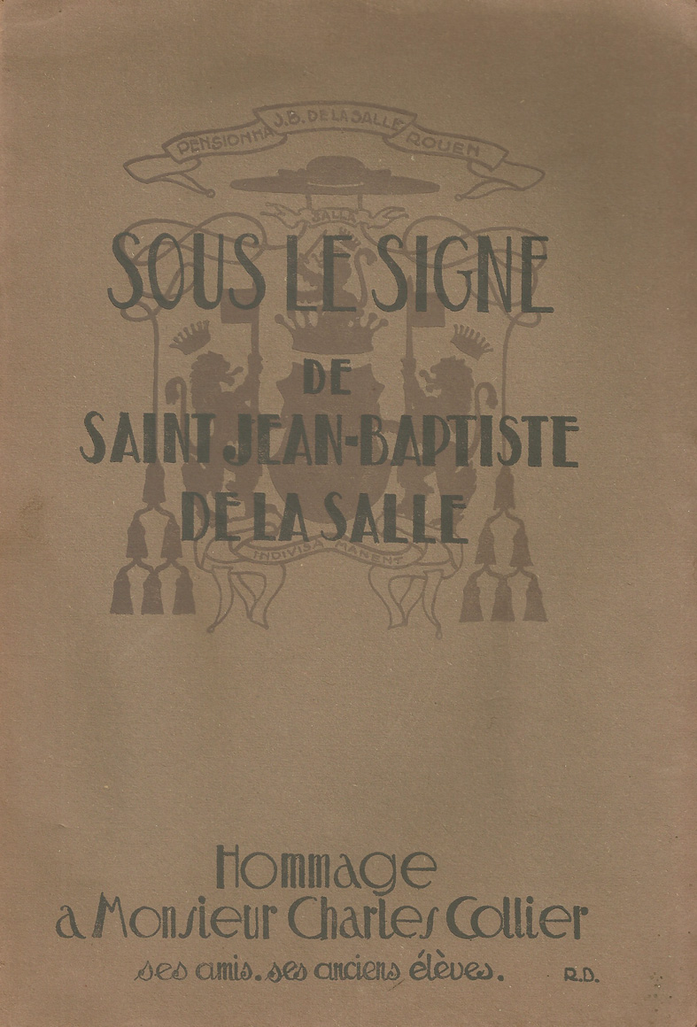 Couverture de la plaquette éditée après le départ de Charles Collier du Pensionnat Jean-Baptiste de La Salle de Rouen en 1926